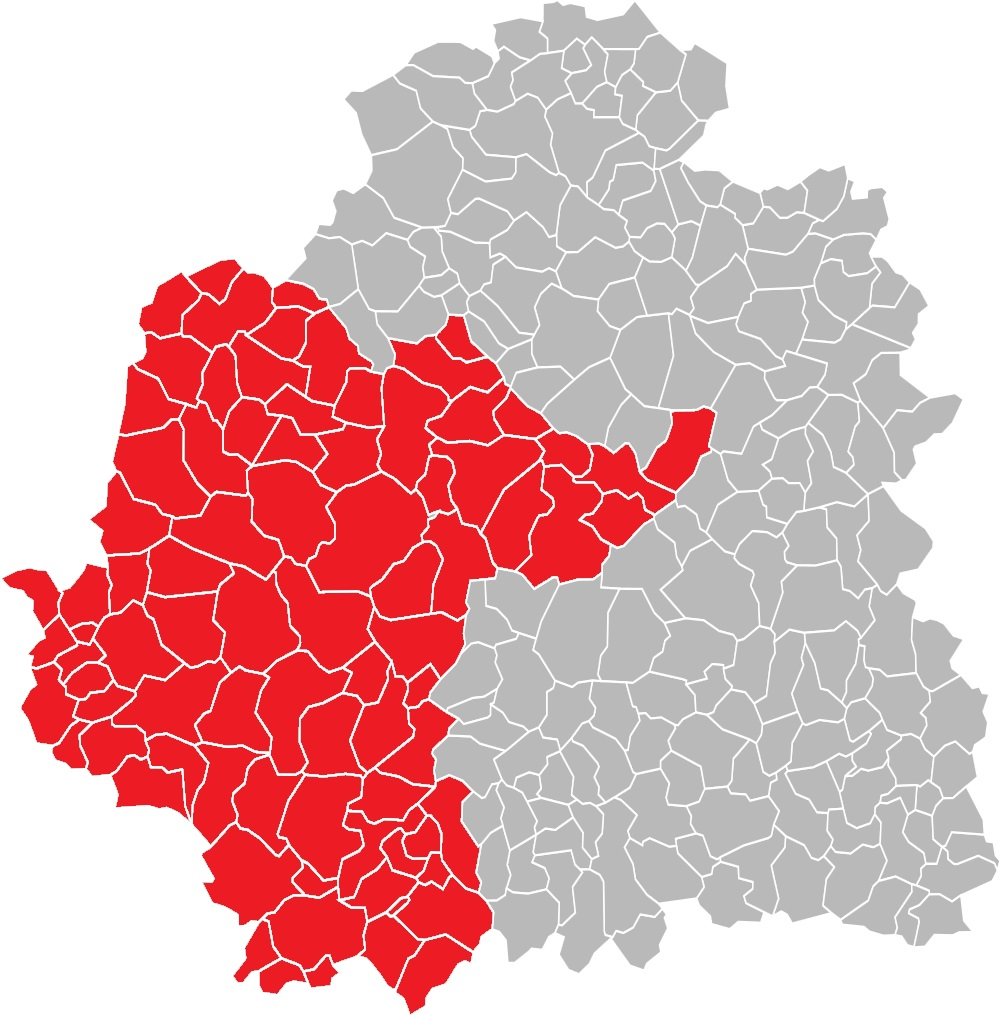 Carte des communes de l'Indre (36) : La première circonscription à compter de 2012.